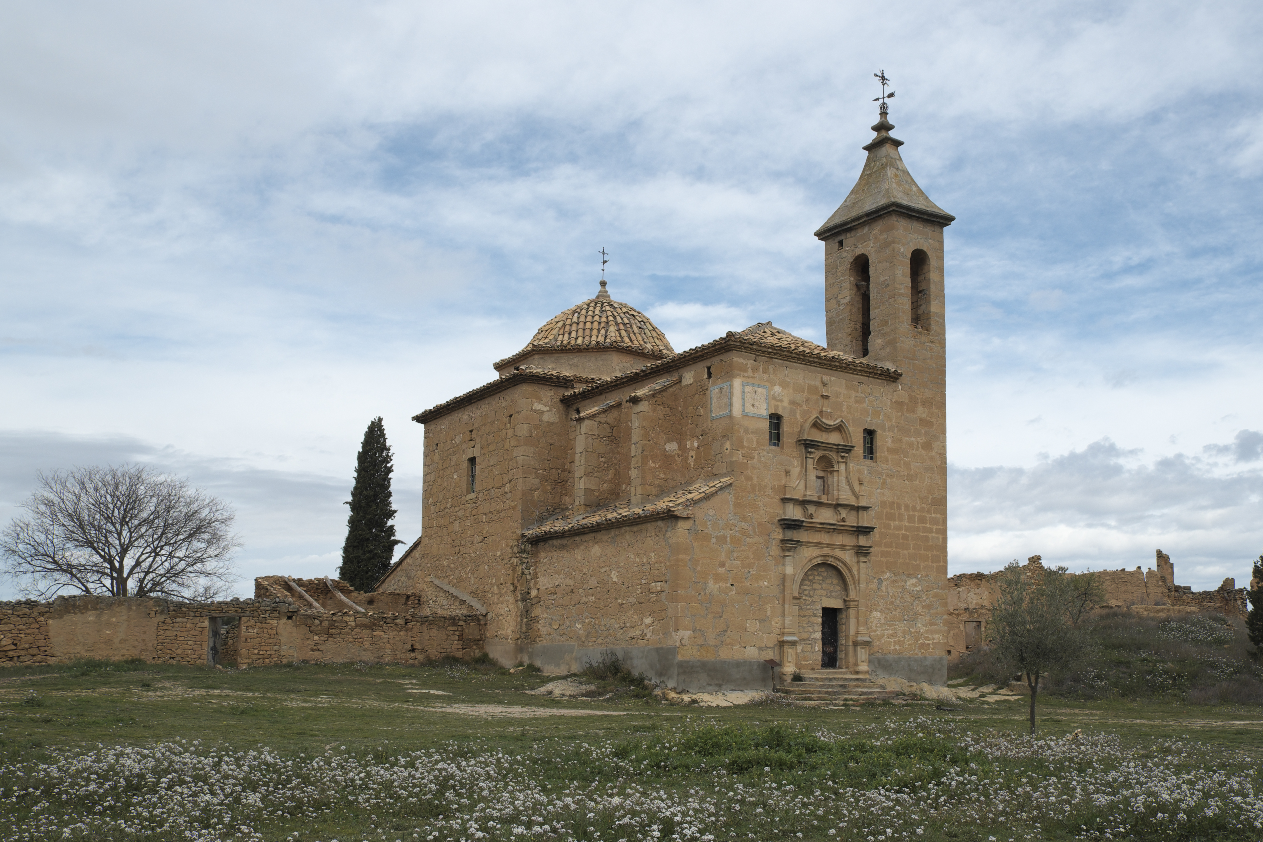 Kirche San Juan Degollado (Johannes-Enthauptung-Kirche) in dem aufgegebenen Ort Mas del Labrador in der Gemeinde Valjunquera in der Provinz Teruel (Aragón/Spanien)